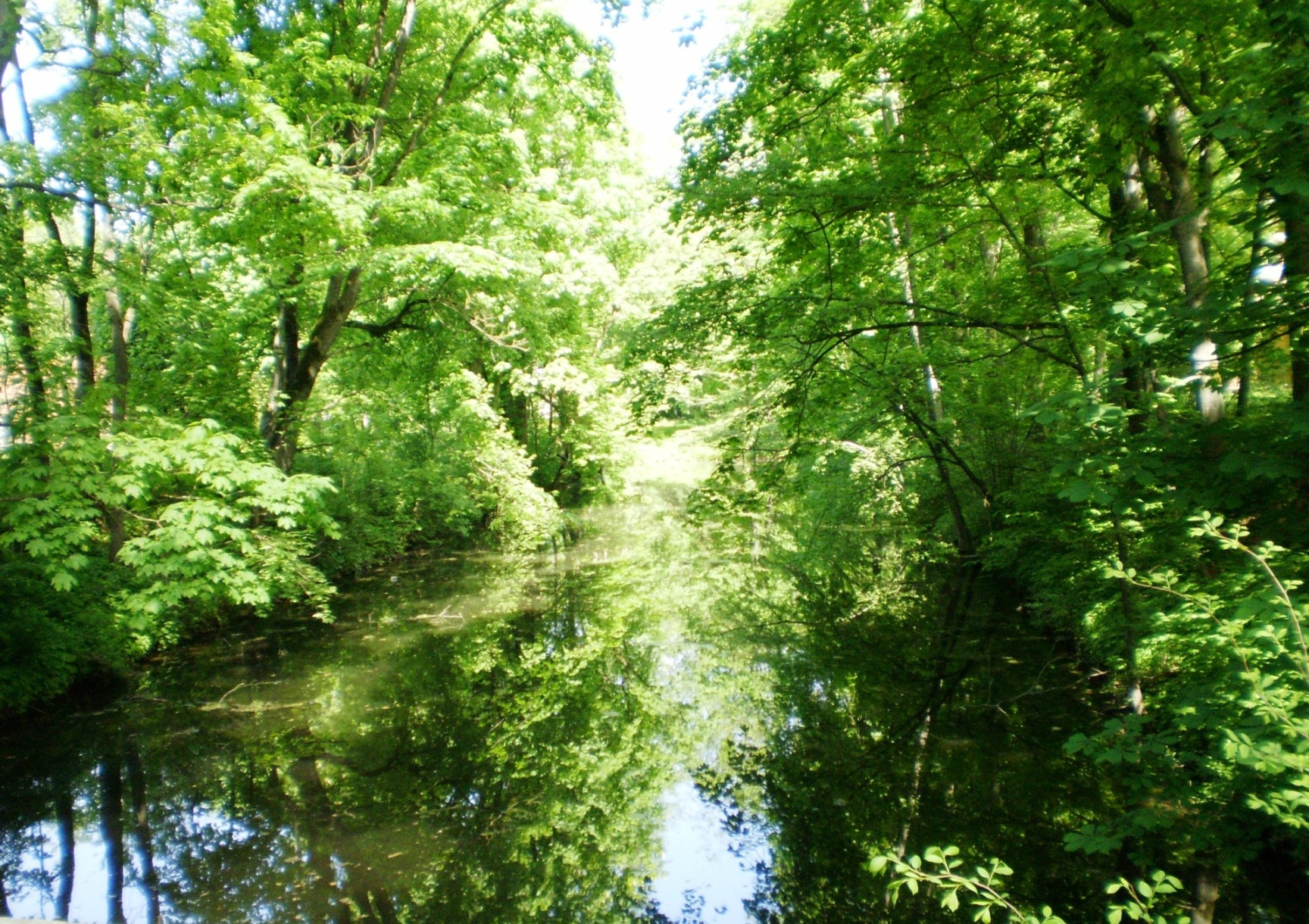 Akademija, dvaro parkas, Kėdainių raj.